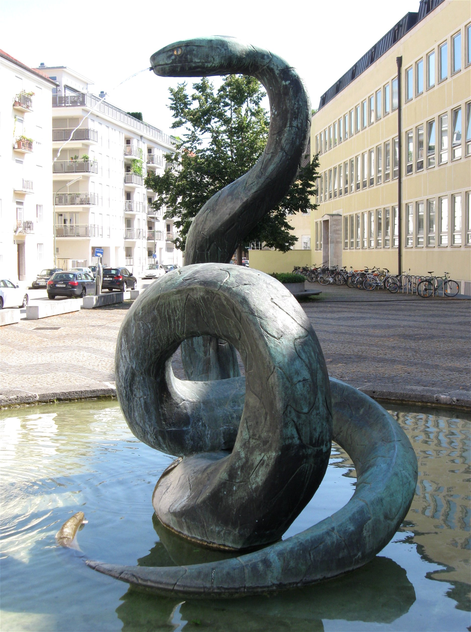 Schlangen-Brunnen, Königinstr. 12, München, 1958 von Lothar Dietz